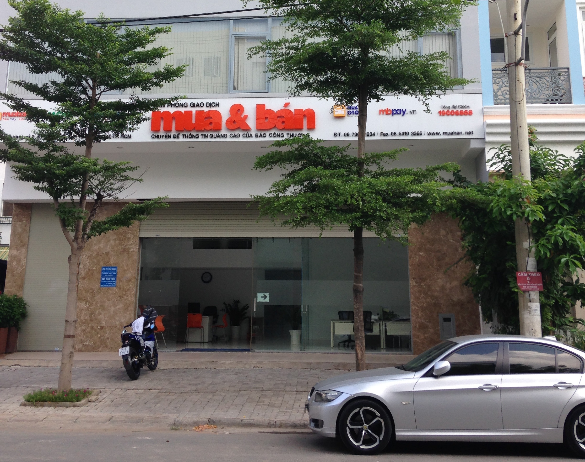 Hình ảnh trụ sở chính của báo rao vặt Mua Bán lúc khách hàng đến đăng tin